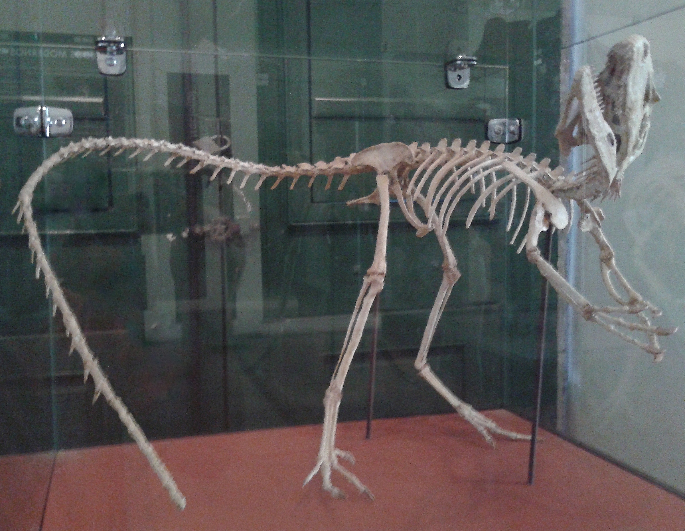 Classification: Saurischia, Tyrannosauroidea Size: 2 meters (length) Feeding: carnivore